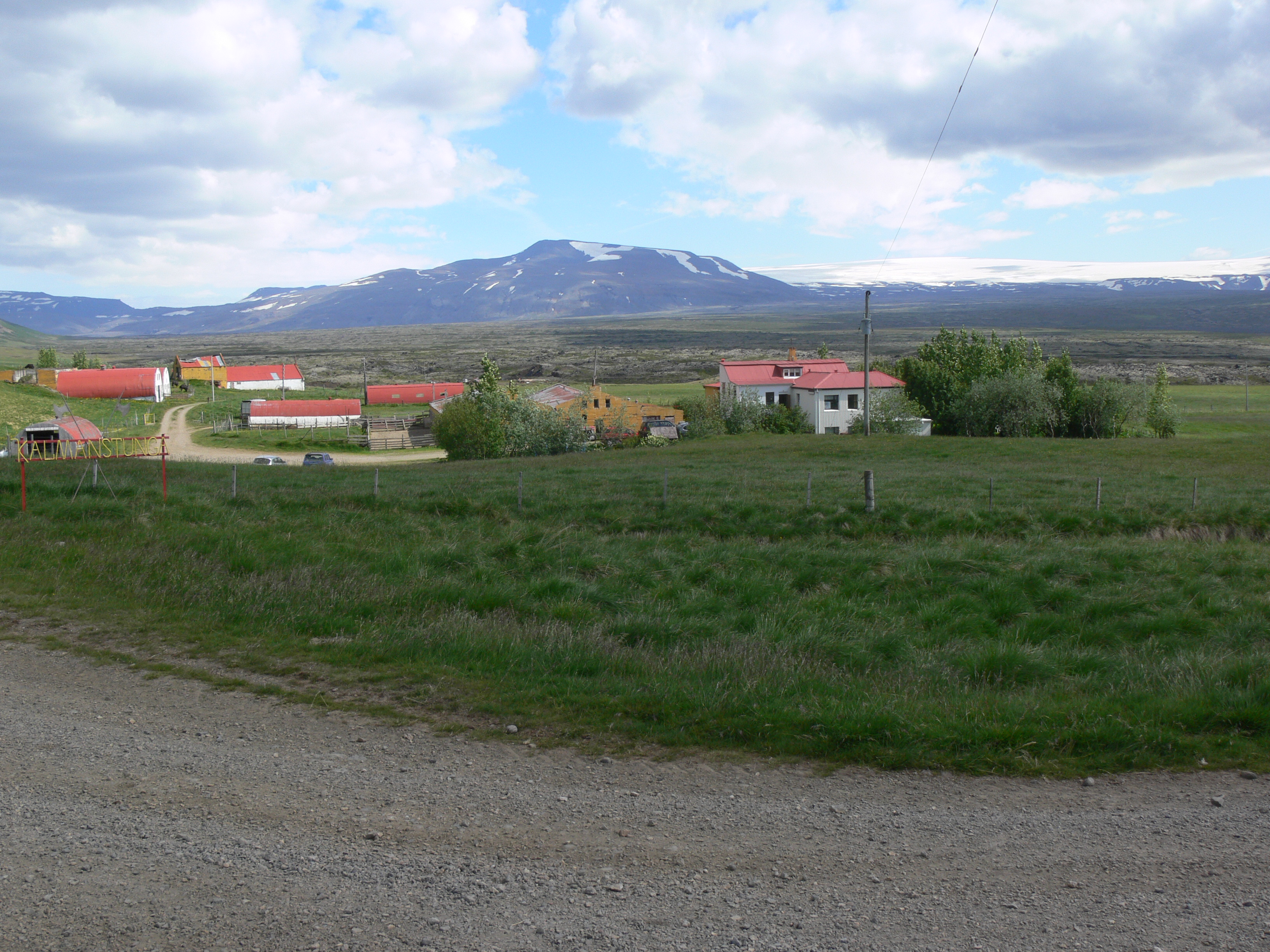 Hof Kalmanstunga am Geitlandshraun in Island. In der Mitte der Hafrafell, rechts Langjökull. Hier kehrte Bischof Jón Arason von Hólar Juni 1541 auf seiner Thingfahrt um, als er erfuhr, dass Bischof Ögmundur Pálsson von Skálholt von den Dänen gefangen genommen worden war. Eine wichtige Phase im Reformationskampf.